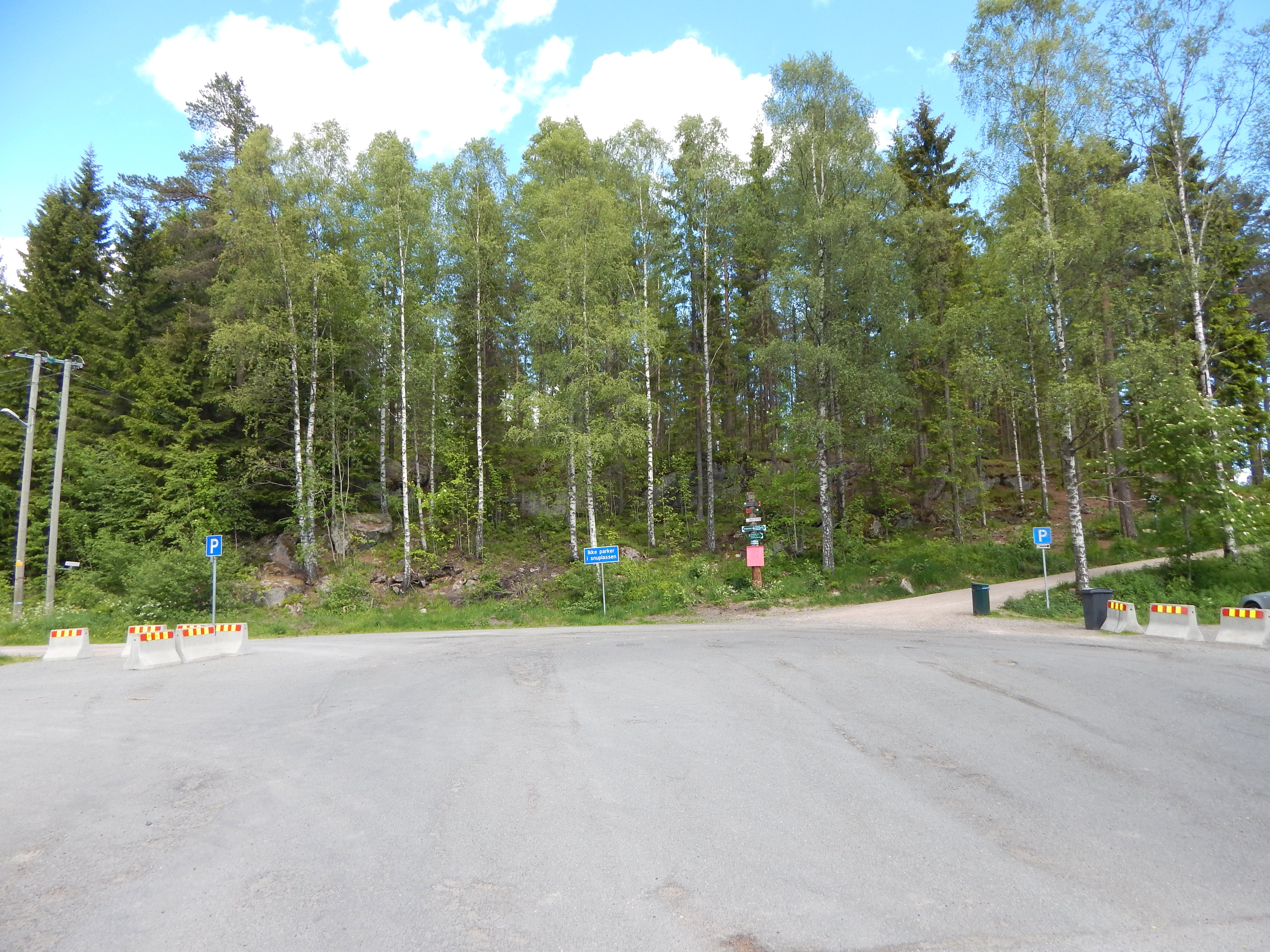 Solemskogveien ender i denne snuplassen.